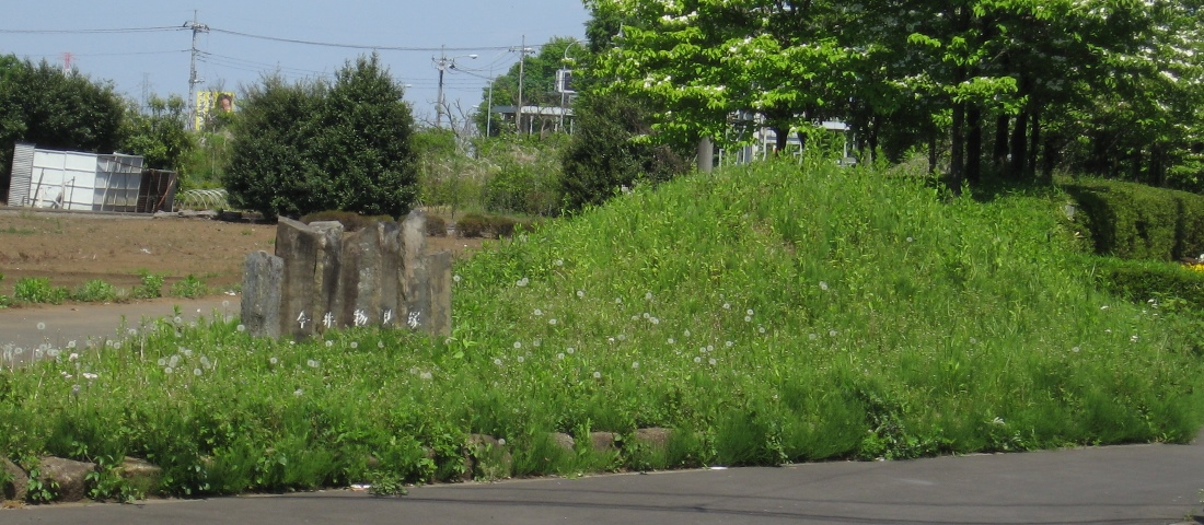 今井物見塚の看板（青梅市今井4丁目）